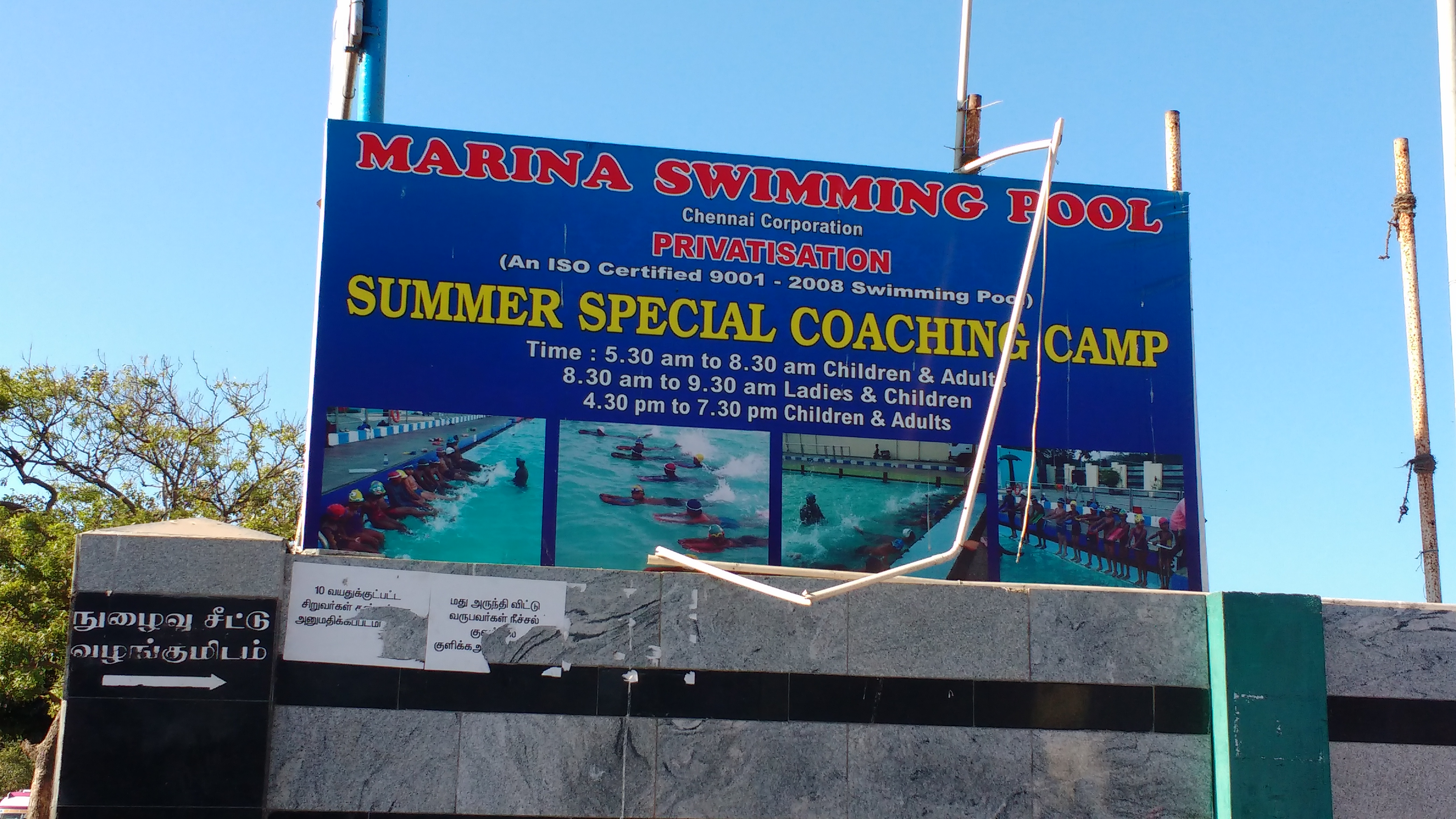 சென்னை மெரினா நீச்சல் குளத்தில் வைக்கப்பட்டுள்ள சிறப்பு பயிற்சி வகுப்பு குறித்த அறிவிப்பு பலகை